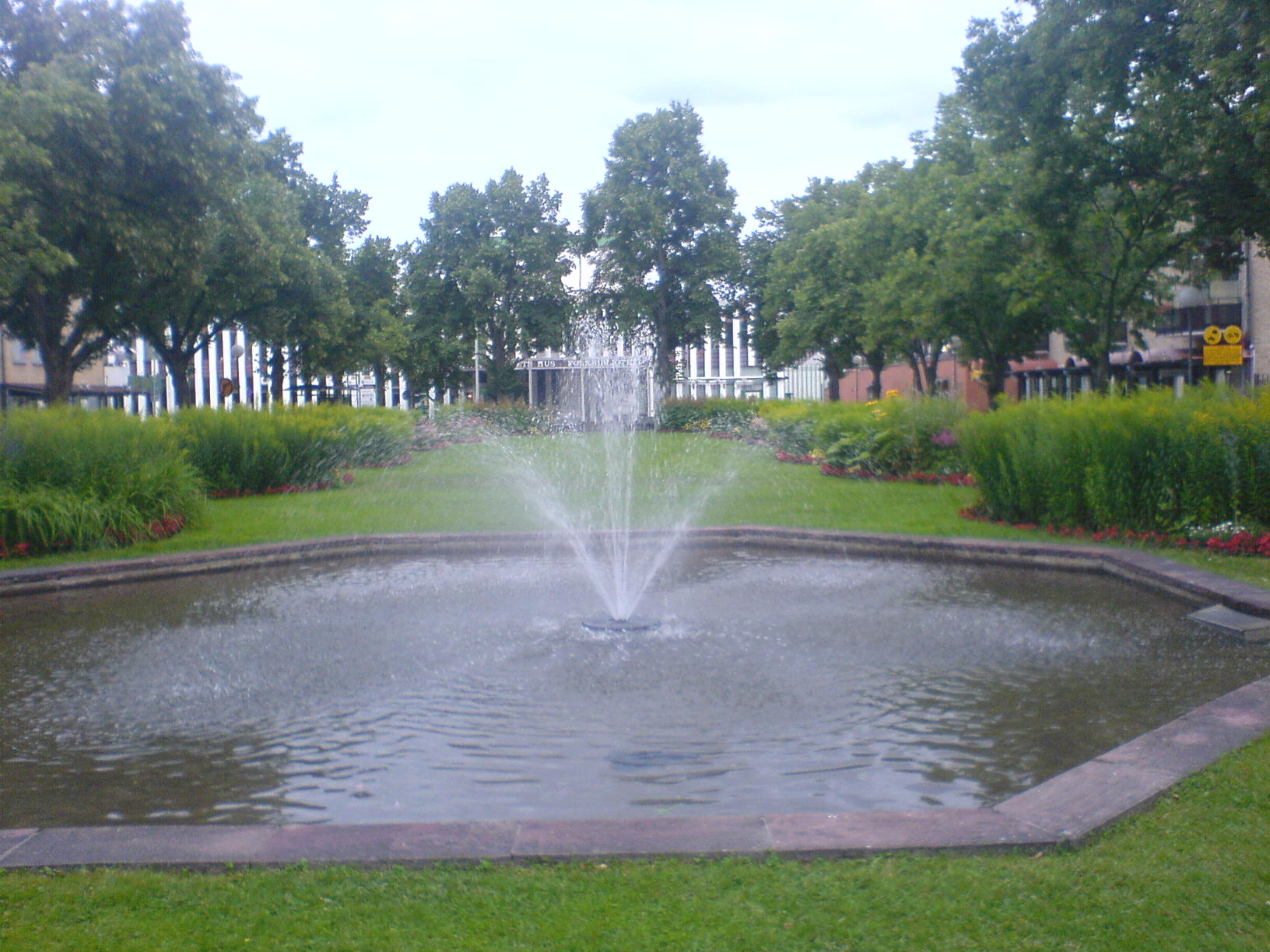 Fontänen i Jensasarken, Sandviken. Folkets Hus i bakgrunden